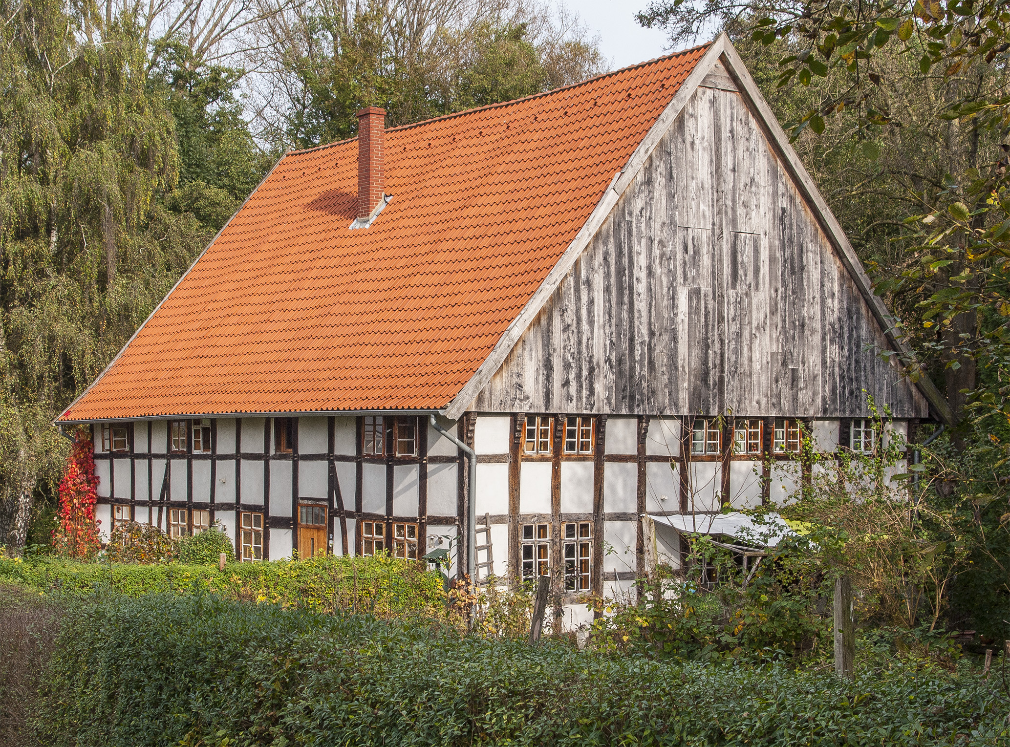 Bad Salzuflen-Wüsten, Vlothoer Str. 15This is a photograph of an architectural monument.